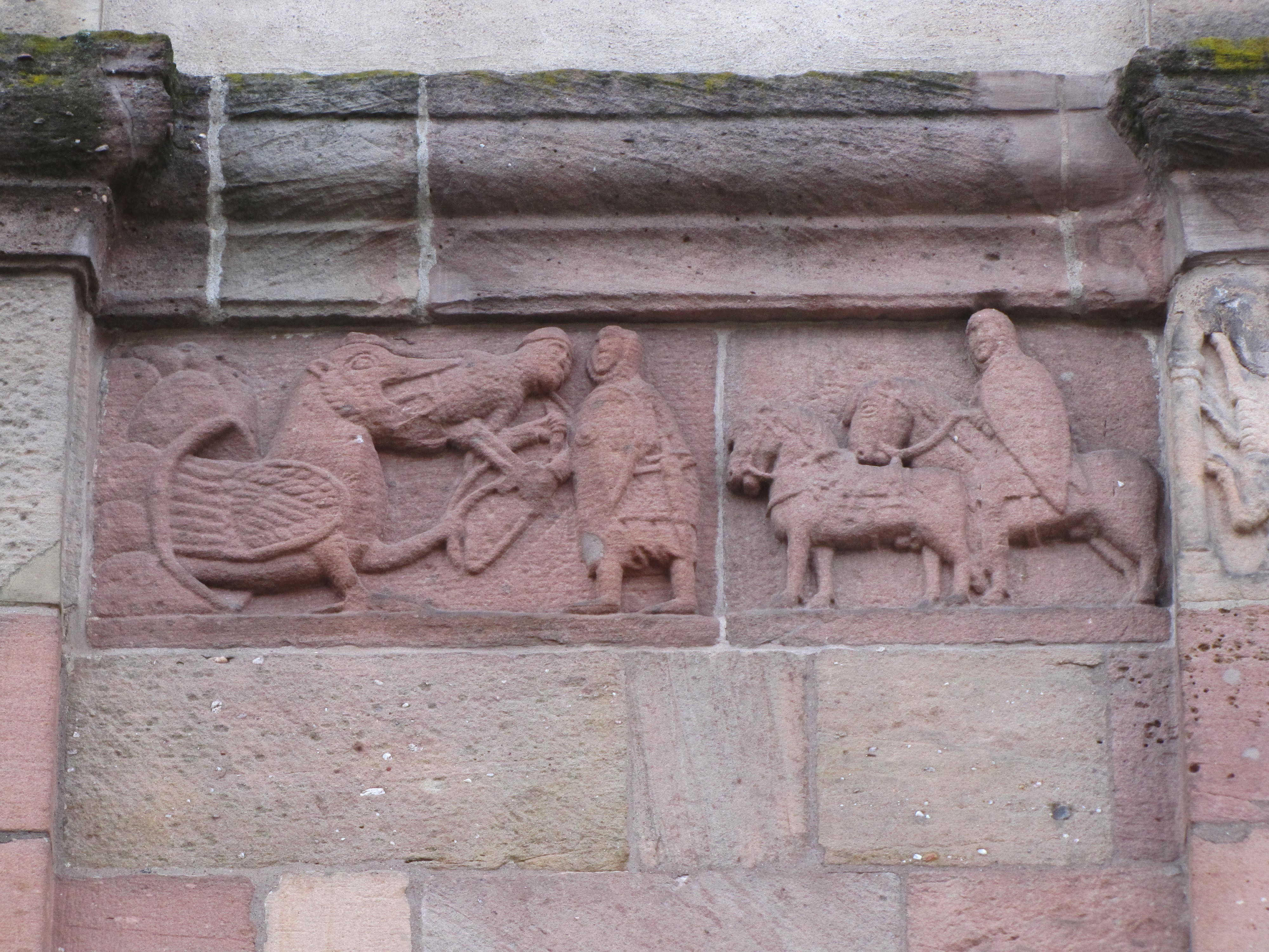 Alsace, Bas-Rhin, Église Saints-Pierre-et-Paul dite Sainte-Richarde (PA00084587, IA00115010). Bas-relief roman sur la frise extérieure: Détail de la frise : Epopée de Dietrich von Bern délivrant Sintram de la gueule du dragon.